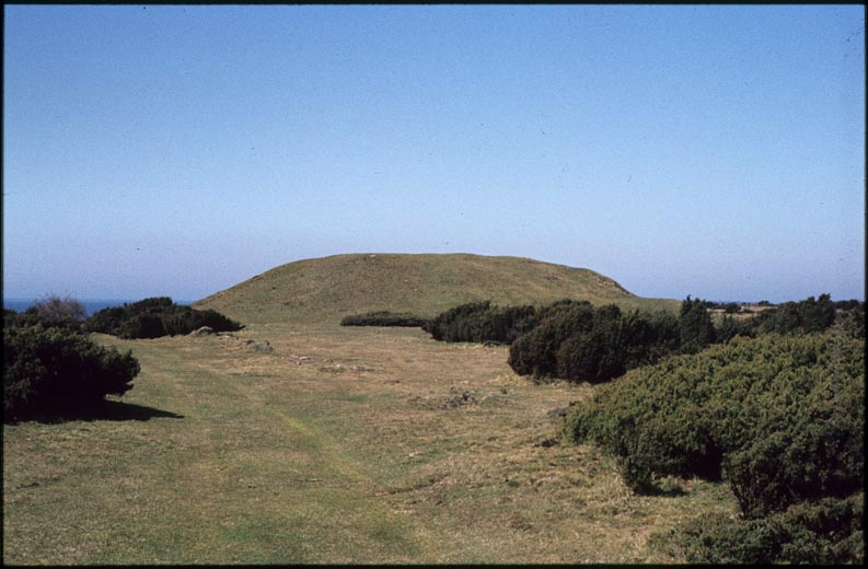 Västra Karup 136:1. Hög, 42 m diam och 5 m h. Motiv: Västra Karup 136:1 Kategori: Hög Västra Karup 136:1. Hög, 42 m diam och 5 m h. Västra Karup 136:1.